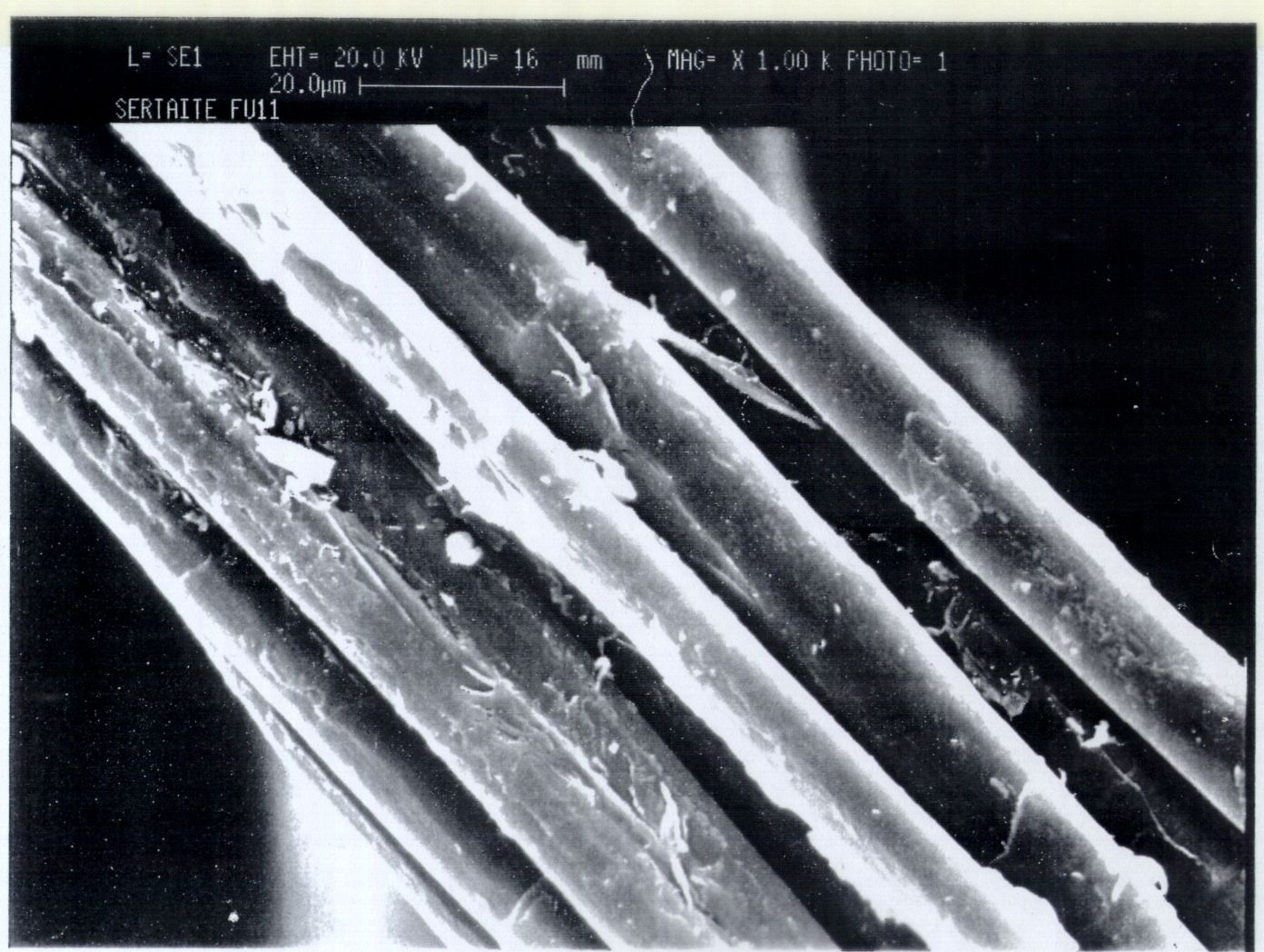 REM Aufnahme der ersten untraschall-aufgeschlossenen Flachsfaser weltweit SETRALIT